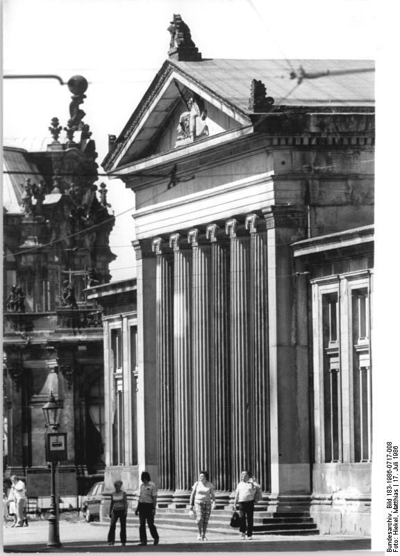 Dresden, Schinkelwache ADN-ZB Hiekel 17.7.1986 Dresden: Schinkelwache- Der einzige Bau des Berliner Klassizismus in Dresden ist die Schinkelwache. Sie wurde von 1830-1832 nach Plänen von Carl Friedrich Schinkel von J. Thürmer in massivem Sandstein errichtet. Das Gebäude mit den sechs kannelierten ionischen Säulen und dem Dreiecksgiebel fügt sich harmonisch in das architektonische Ensemble Zwinger, Semperoper und Theaterplatz ein. Die Schinkelwache wurde am 13. Februar 1945 zerstört, 1955 56 wieder aufgebaut und jetzt erneut rekonstruiert. Das Gebäude beherbergt jetzt den Besucherdienst der Staatsoper Dresden und die zentralen Vorverkaufskassen. (siehe 1986-0717-009)